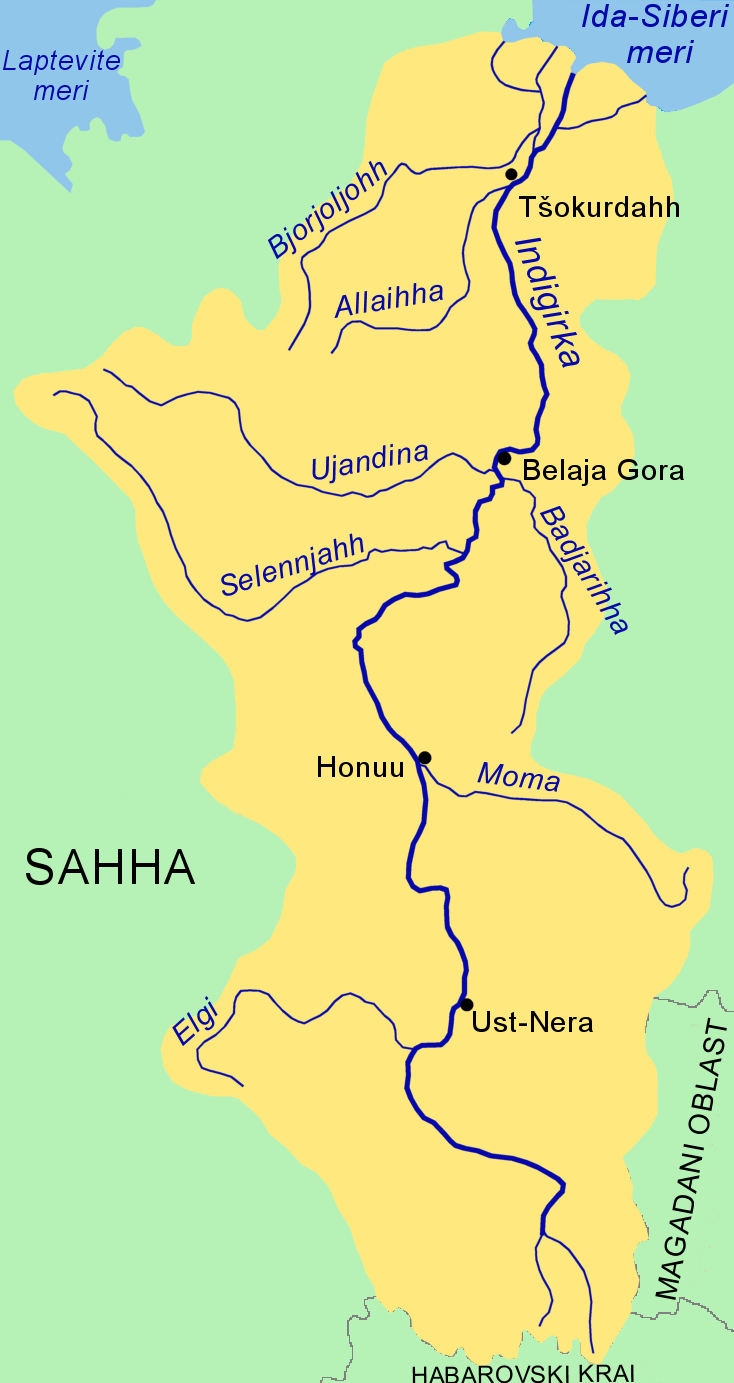 Indigirka jõgi